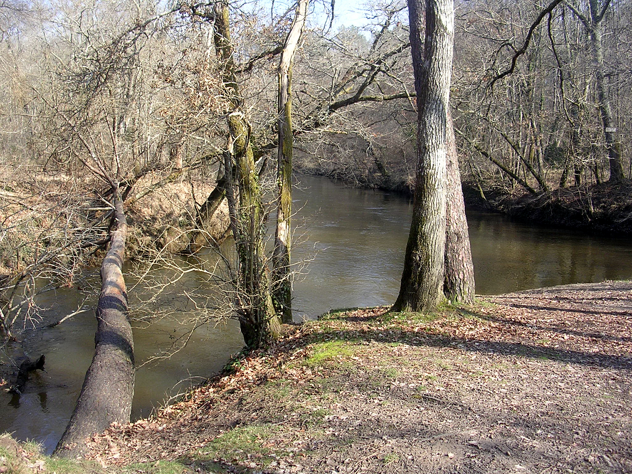 Confluence de la Grande Leyre (à gauche sur la photo) et de la Petite Leyre (à droite), formant la Leyre (ou l'Eyre), à Moustey, dans le département français des Landes.